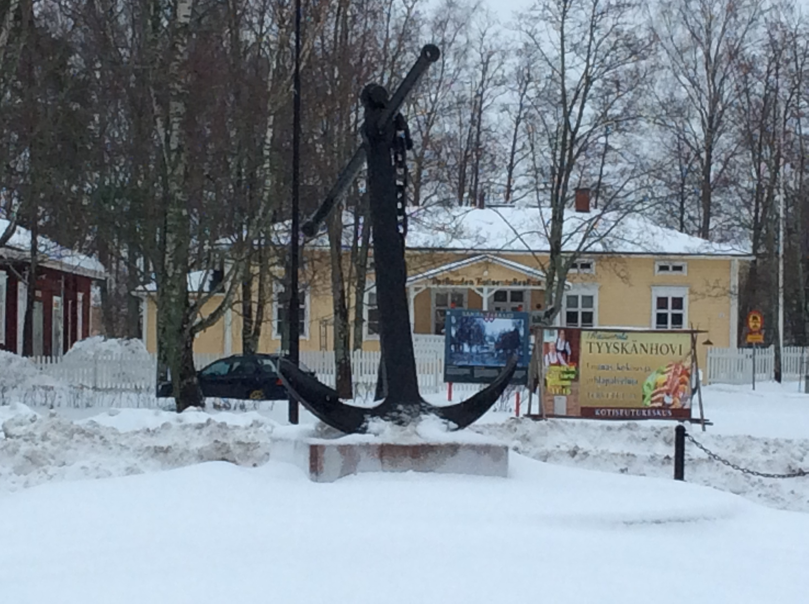 Vuonna 2011 Varkauden kaupungintalon läheisyyteen rakennettiin liikkenneympyrä ja sen keskelle, puuhamies Jani Viljakaisen johdolla etsittiin suurta ankkuria, jonka sitten löysi Virosta etelä-suomalainen laivantarvike/sisustusfirma. Suuren ankkurin kunnosti ja laittoi paikalleen varkautelainen MetalMix Oy. Näin tuo ankkuri täydensi muistoja laivojen rakentamisesta Varkaudessa.